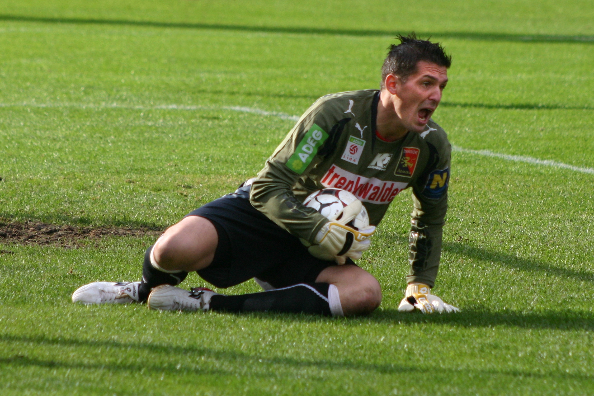 Thomas Mandl – Trenkwalder Admira Wacker (Bild 2)